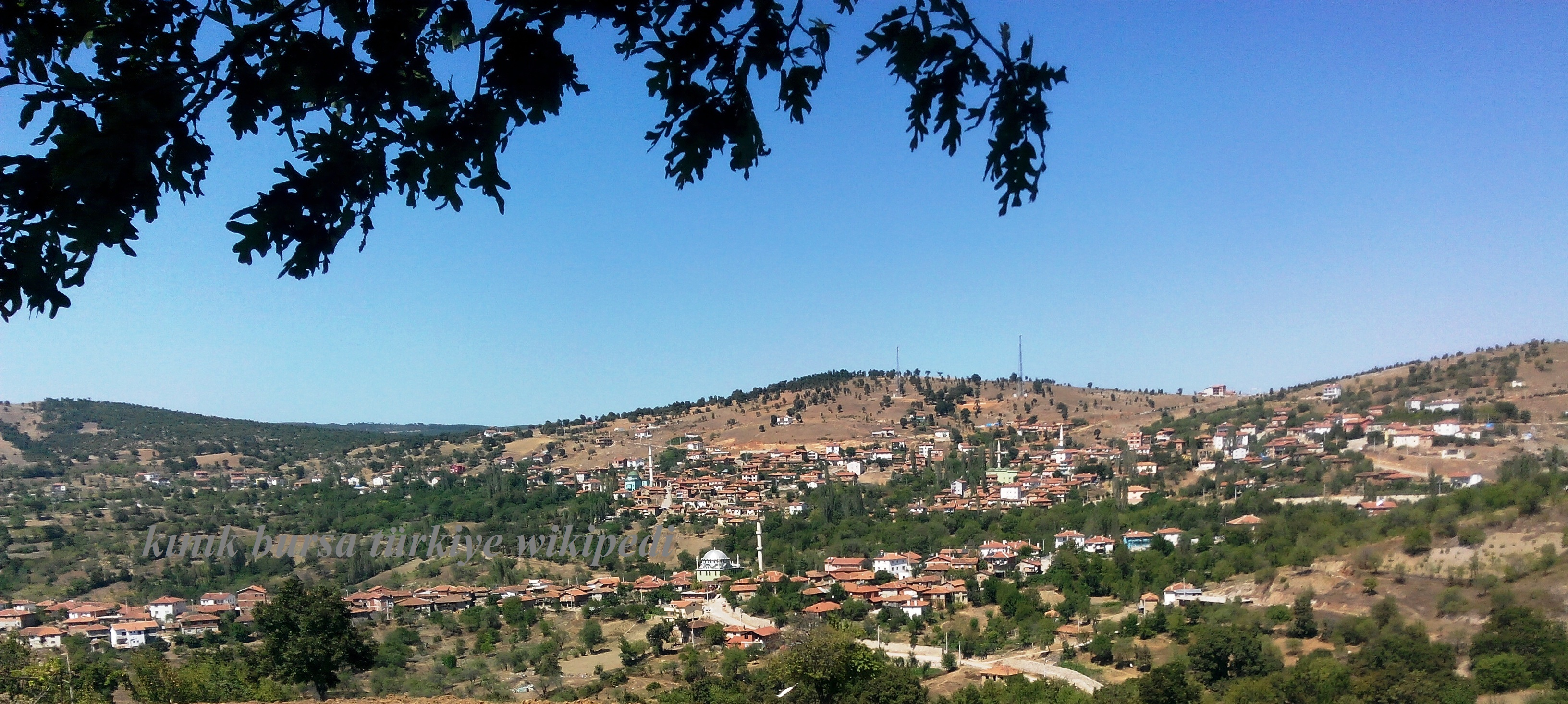 kınık bursa türkiye bahar görünümü